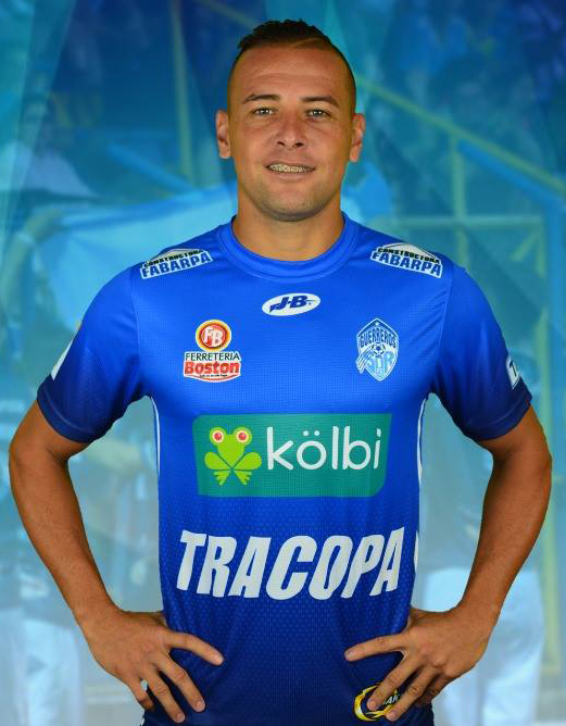 Juan Gabriel Guzmán en su presentación oficial con el Pérez Zeledón en 2017.